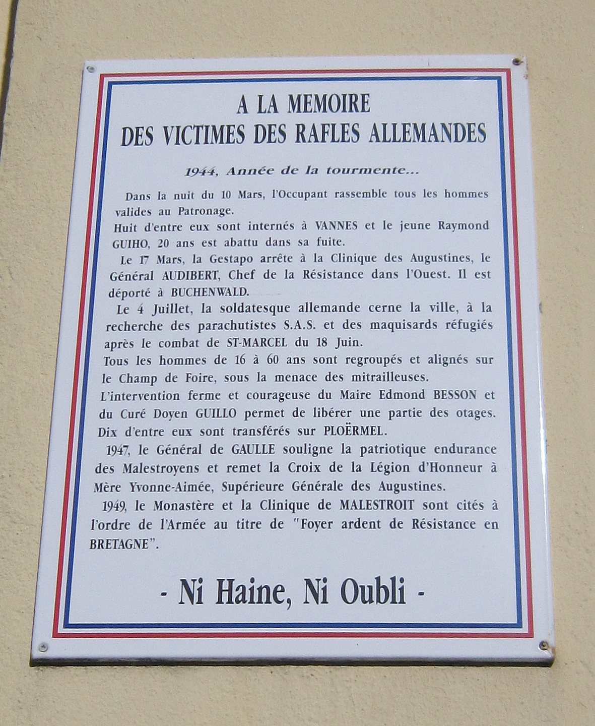 Malestroit : panneau commémoratif de faits survenus à Malestroit pendant la Seconde Guerre mondiale (mur extérieur de la mairie de Malestroit).